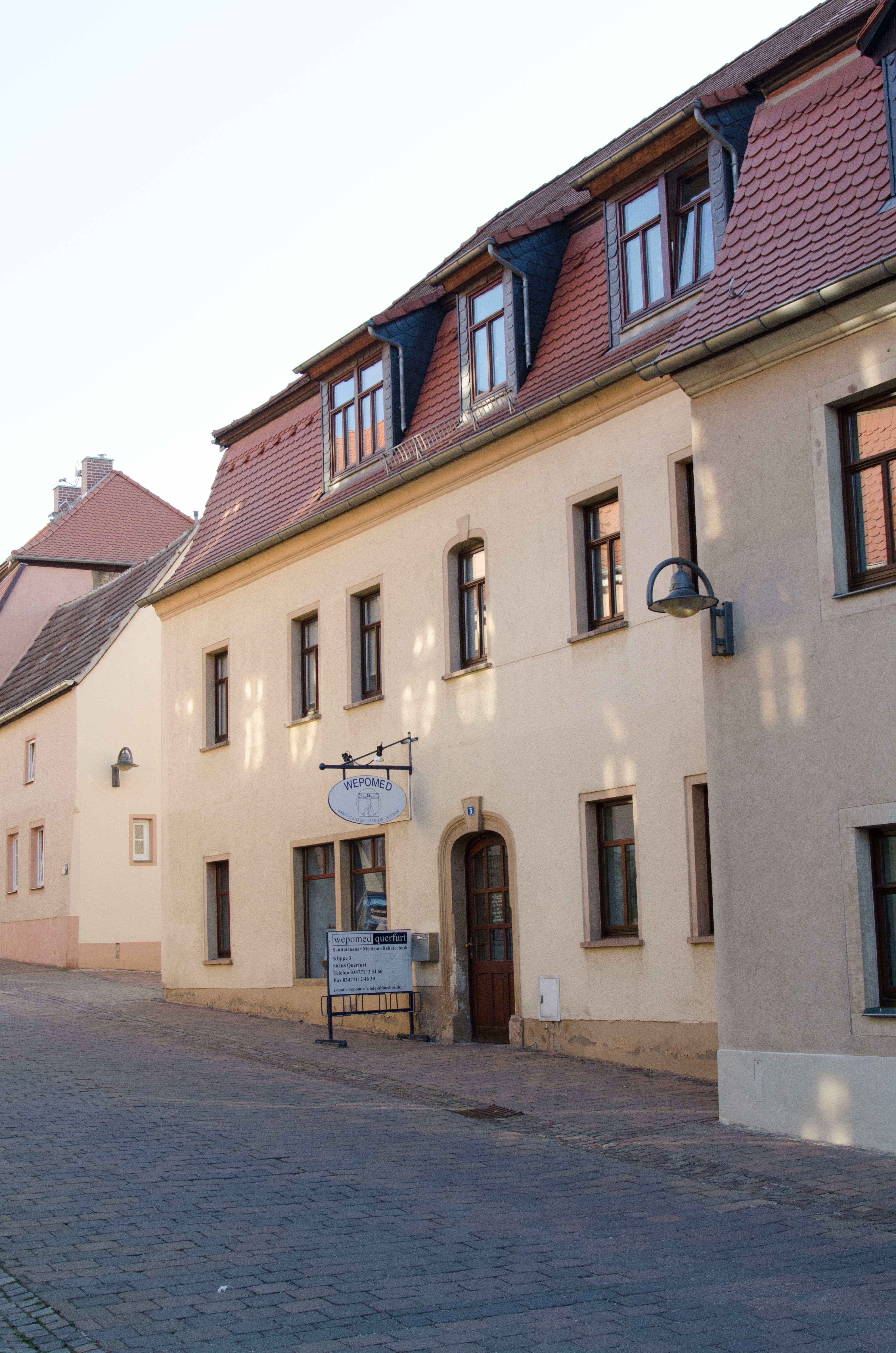 Querfurt, Klippe 3